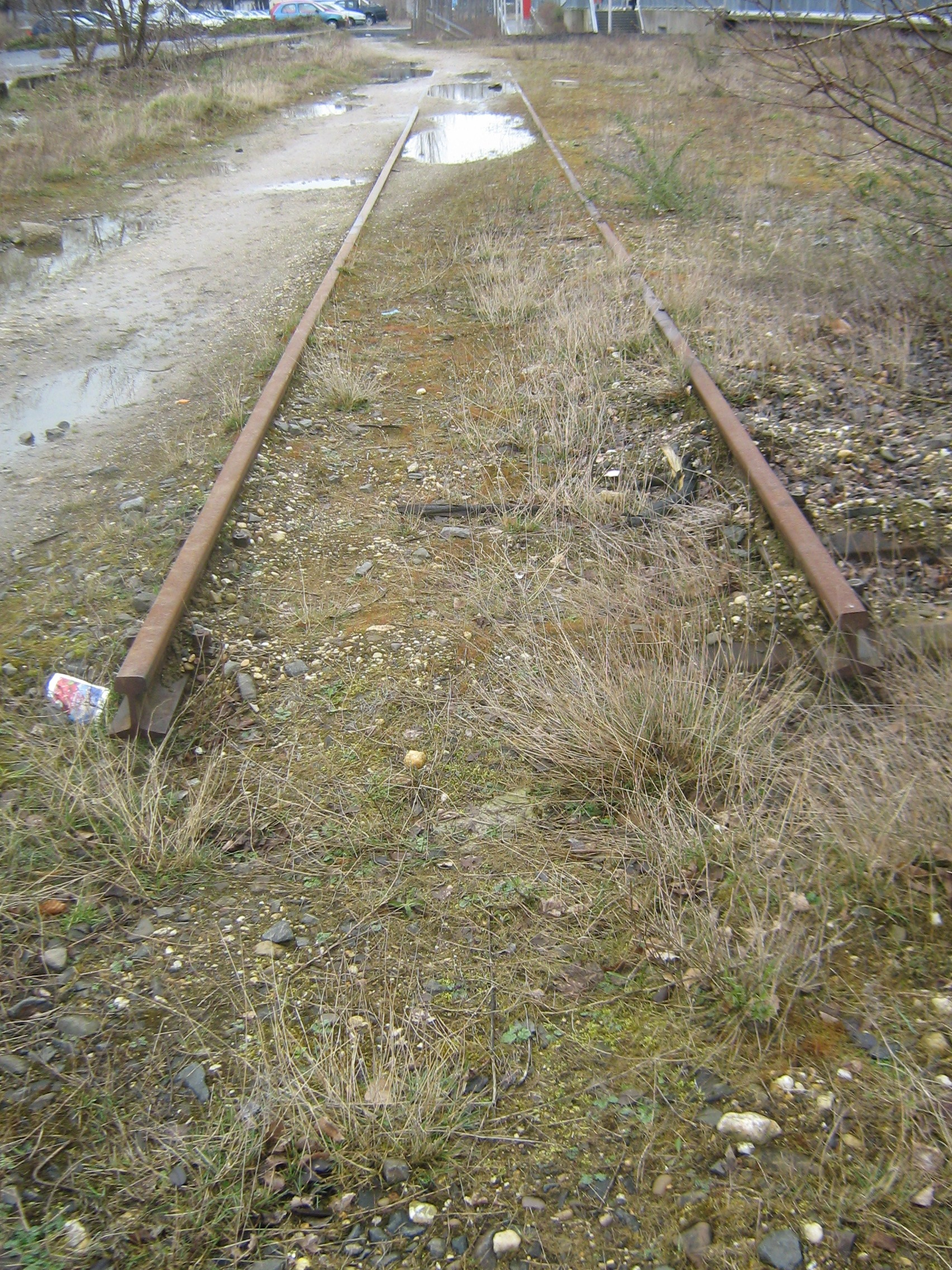 Stillgelegtes Rangiergleis im Bahnhof Eitorf